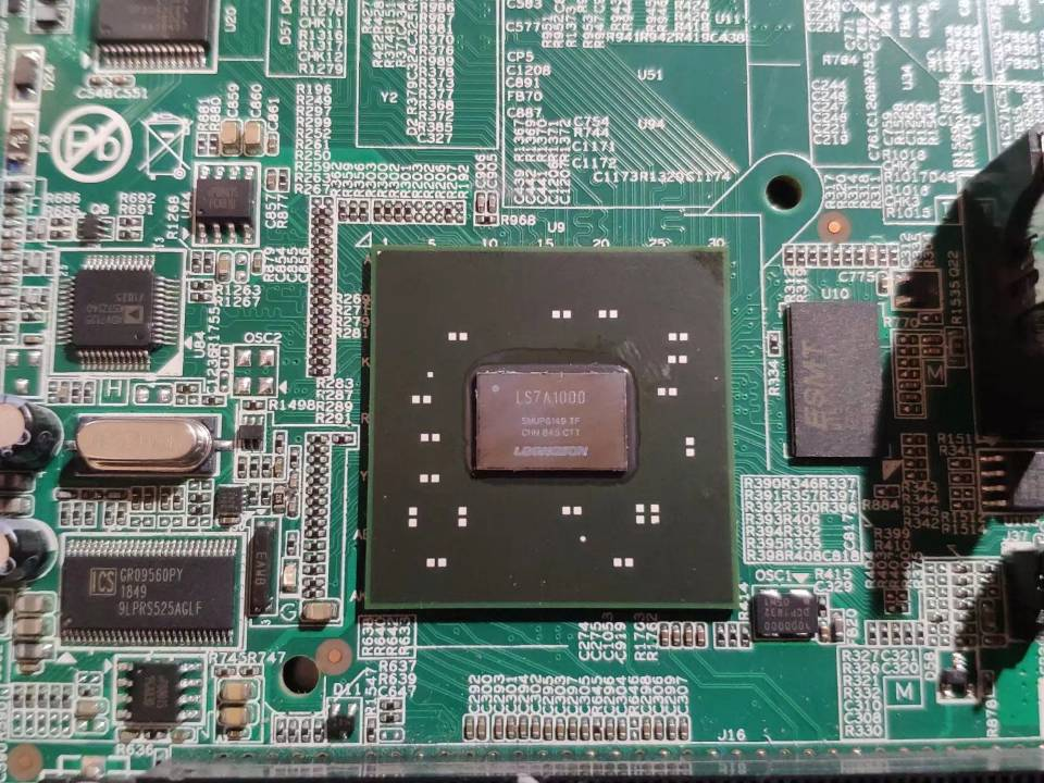 龙芯7A1000芯片正面照